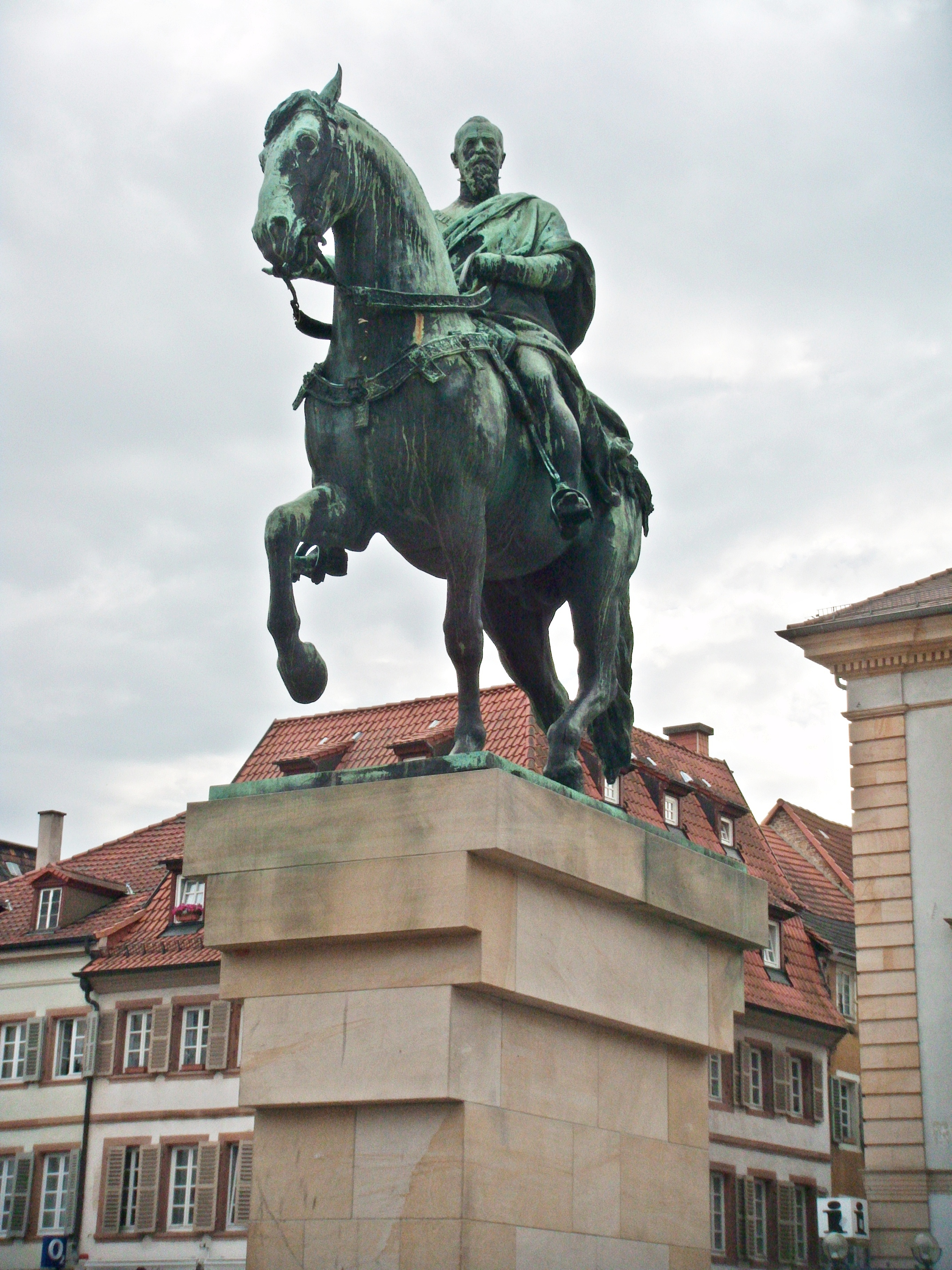 Reiterdenkmal des Prinzregenten Luitpold von Bayern (1821-1912), Marktplatz Landau in der Pfalz, von Wilhelm von Rümann (1850-1906), errichtet 1892